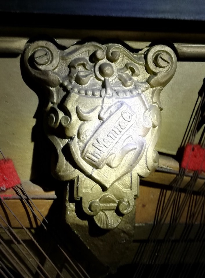 Skulpturale Firmenplakette von Th. Mann & Cie. auf dem Klavier mit Seriennummer 4235, entstanden um 1893.